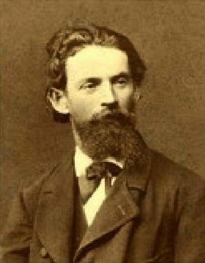 Malíř Eduard Steffen (1839-1893), český akademický malíř, středoškolský pedagog a veřejný činovník